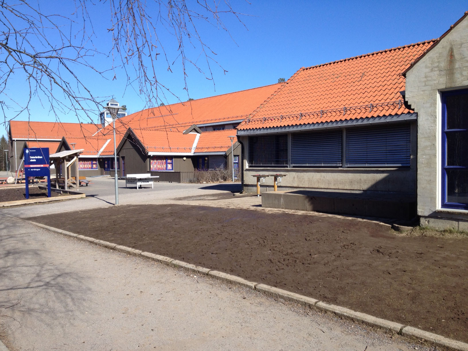 Seterbråten skole i Oslo